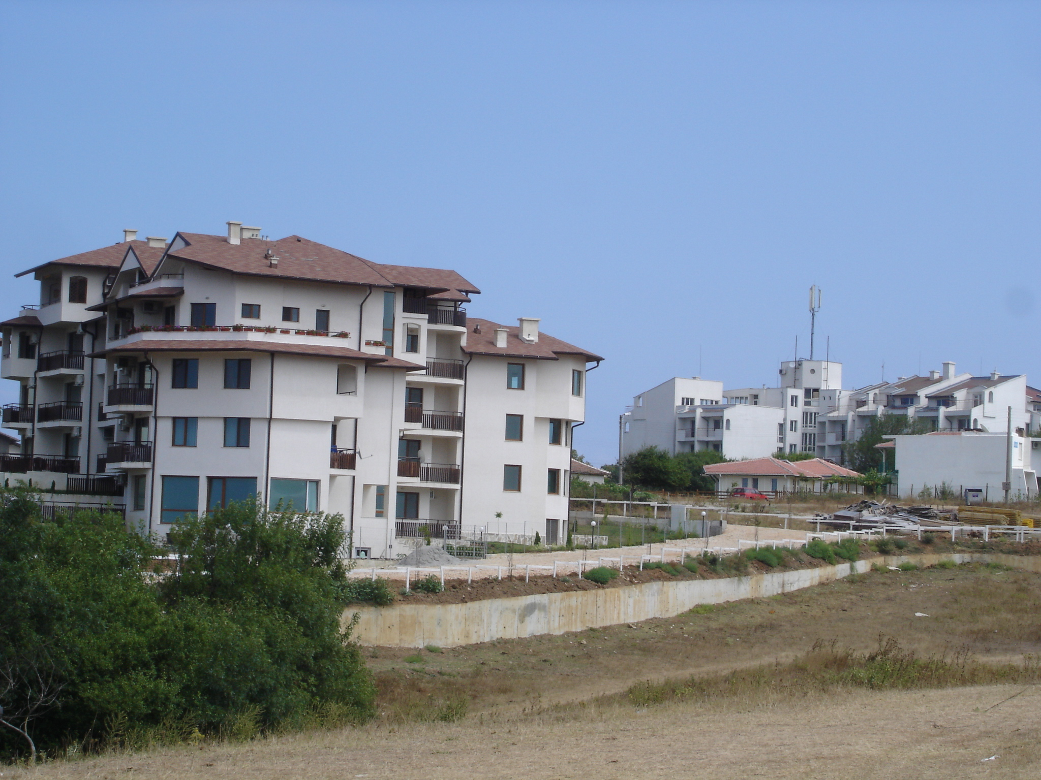 Sinemorets, Bulgaria